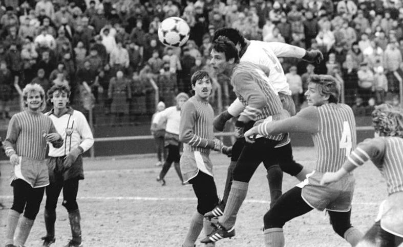 ADN-ZB-Oberst-7.3.87-zin- Berlin: Fußball-Oberliga HFC Dynamo gegen FC Rot-Weiß Erfurt 2:0 (0:0)- Zum Kopfball hochgestiegen sind der Erfurter Peter Jung (3.v.r.) und BFC-Torschütze Frank Pastor (dahinter halb verdeckt). Der Berliner Stürmer setzte sich durch seinen verwandelten Elfmeter mit zwölf Treffern an die Spitze der Torschützenliste. FRank Kräuter (Erfurt-l.), Thomas Doll (BFC-2.v.l.), Wolfgang Döring (Erfurt-3.v.l.) und Olaf Berschuck (Erfurt-2.v.r.-Nr.4) beobachten die Szene.